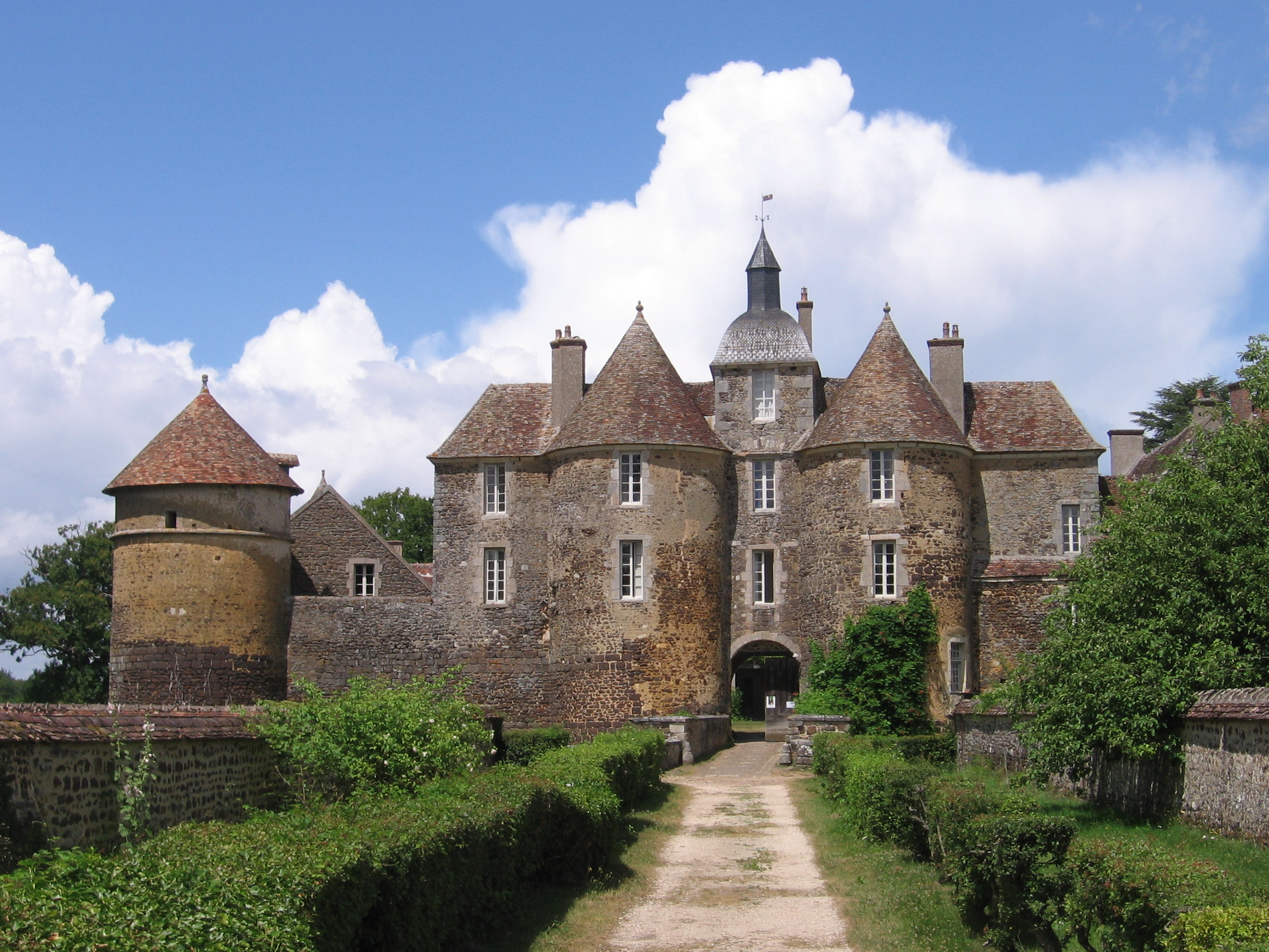 Allée et entrée du château .